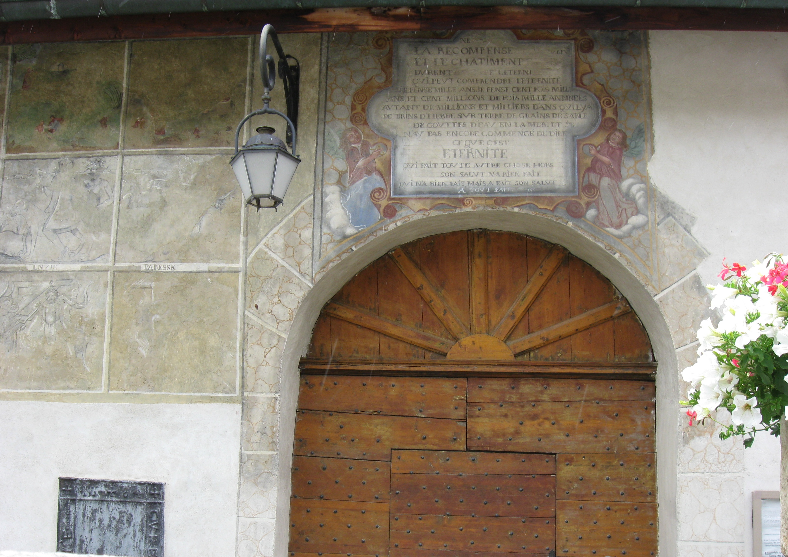 Fresques murales de l'église Saint-Thomas-Becket. (Avrieux, Savoie, Rhône-Alpes).